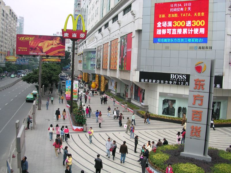 Shopping. Near Dong Jie Kou, Fuzhou